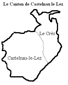 Le Canton de Castelnau le Lez Image personnelle